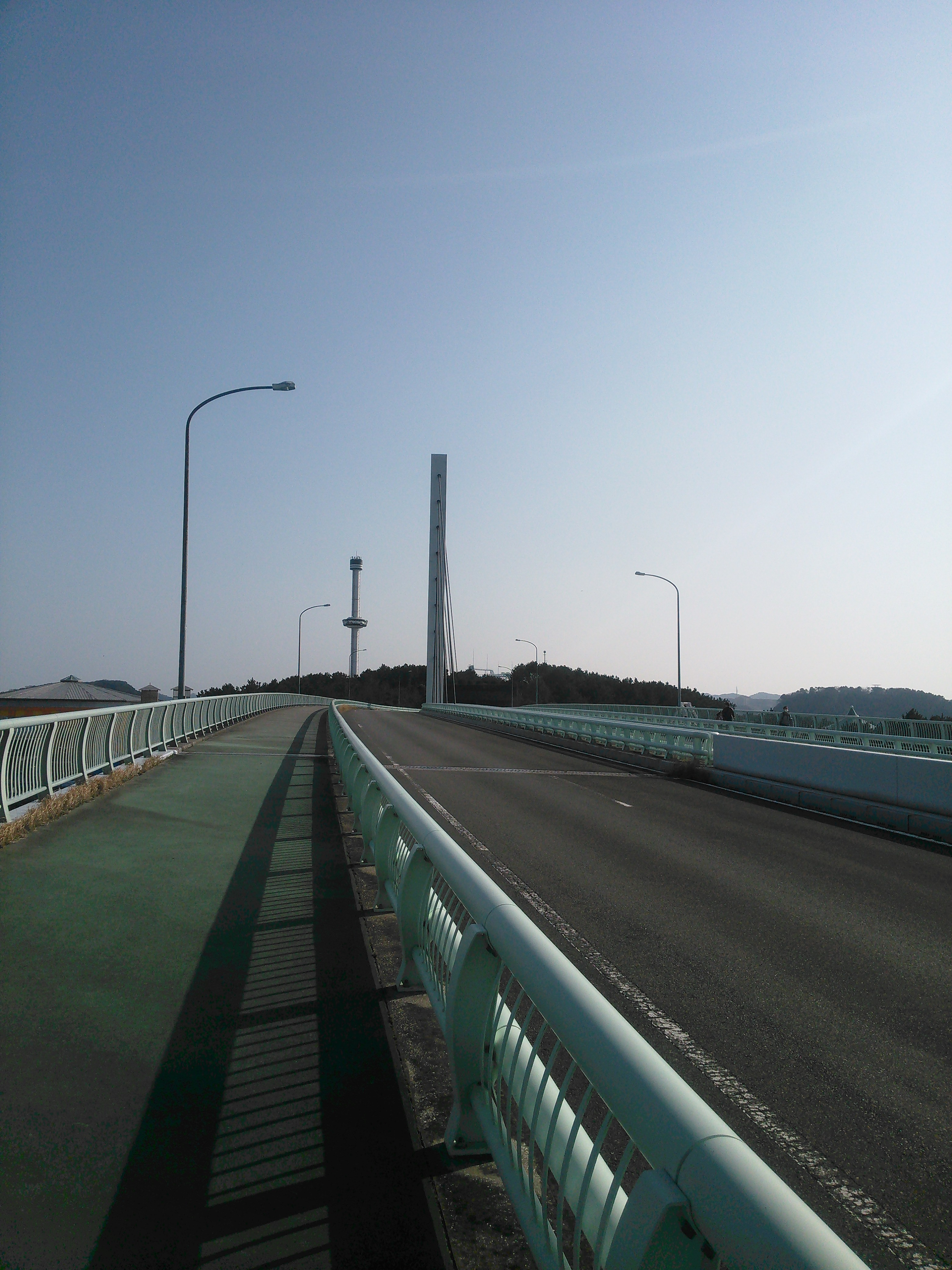 横浜市金沢区。福浦と八景島を結ぶ、国道357号の柴航路橋。福浦側から八景島方面を望む。